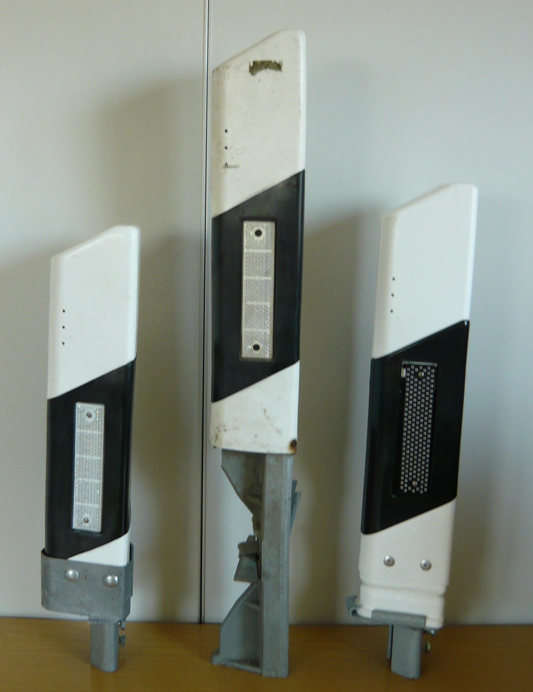 Aufsatzleitpfosten mit unterschiedlichen Halterungen